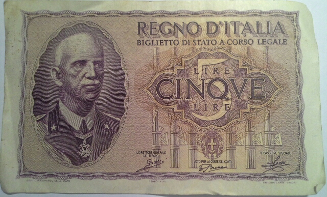 Biglietto di Stato (banconota) da 5 lire dell'era fascista.